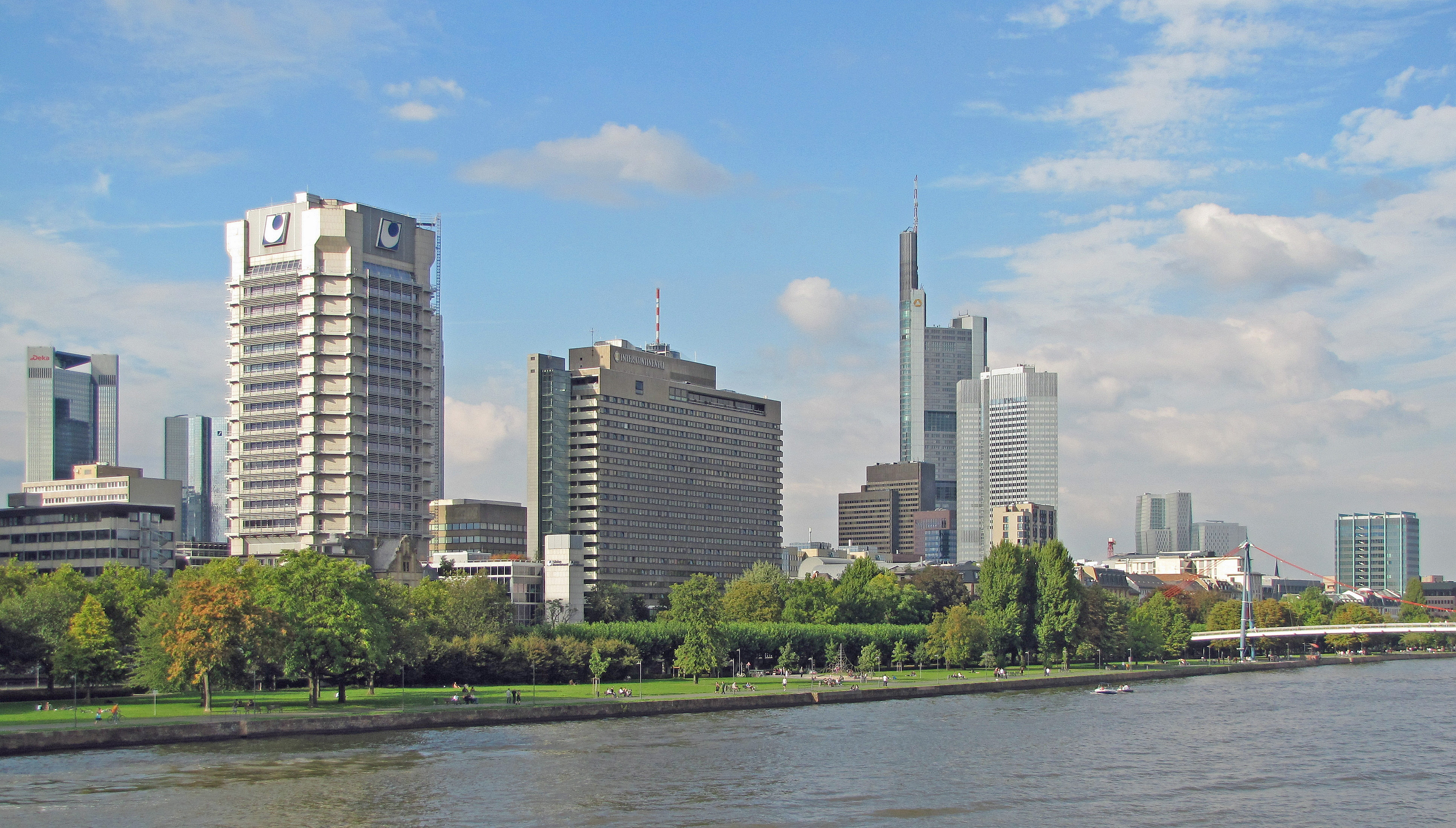 Das "Nizza" (Mittelteil), nördliche Mainufer-Anlage in Ffm. Im Hintergrund und in Ufernähe (v.l.n.r.) das Union-Haus, und das "Intercontinental"-Hotel. Etwas entfernter, die Hochhäuser des Bankenviertels und der Innenstadt.